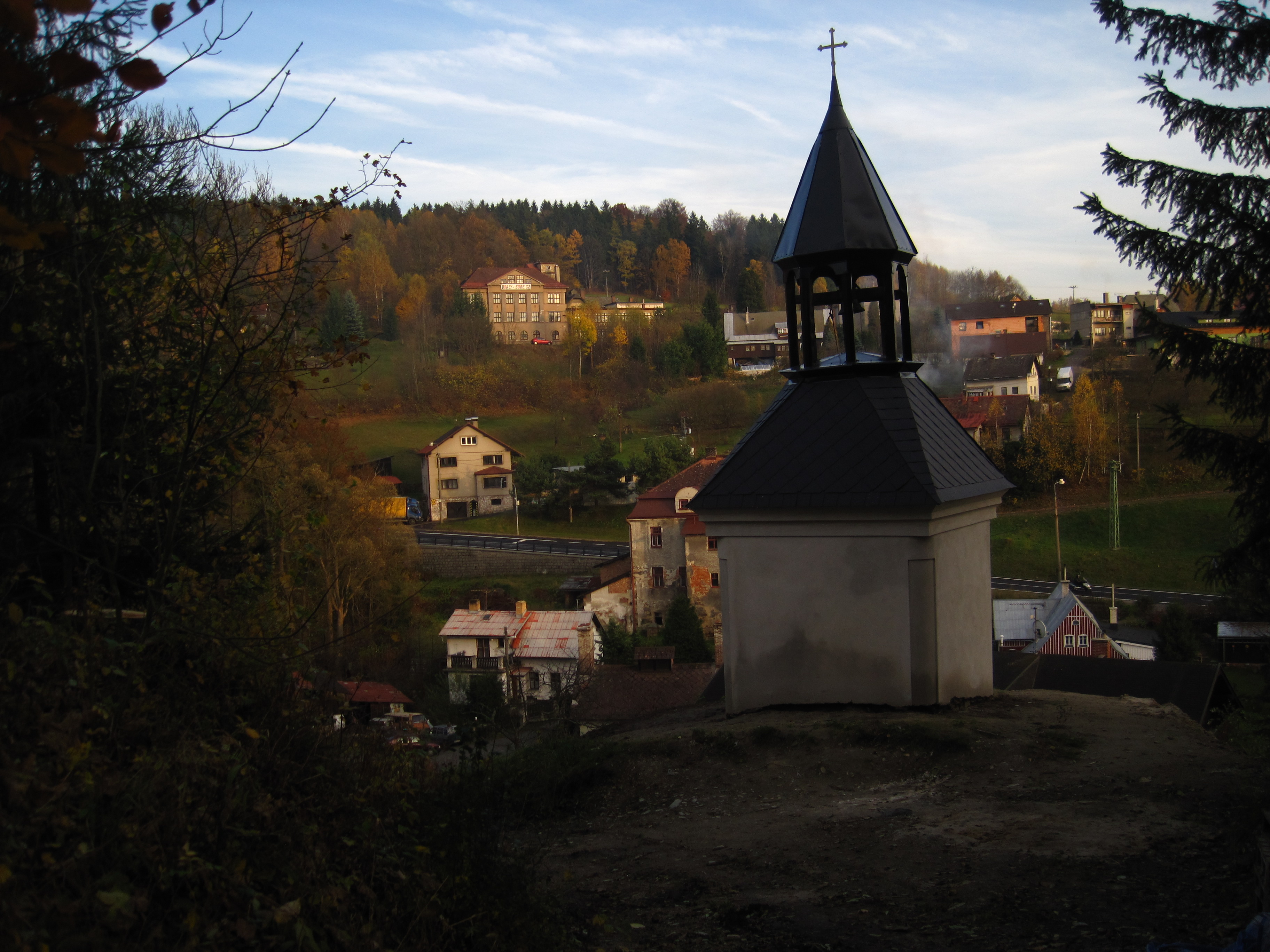 Loužnice - kaplička